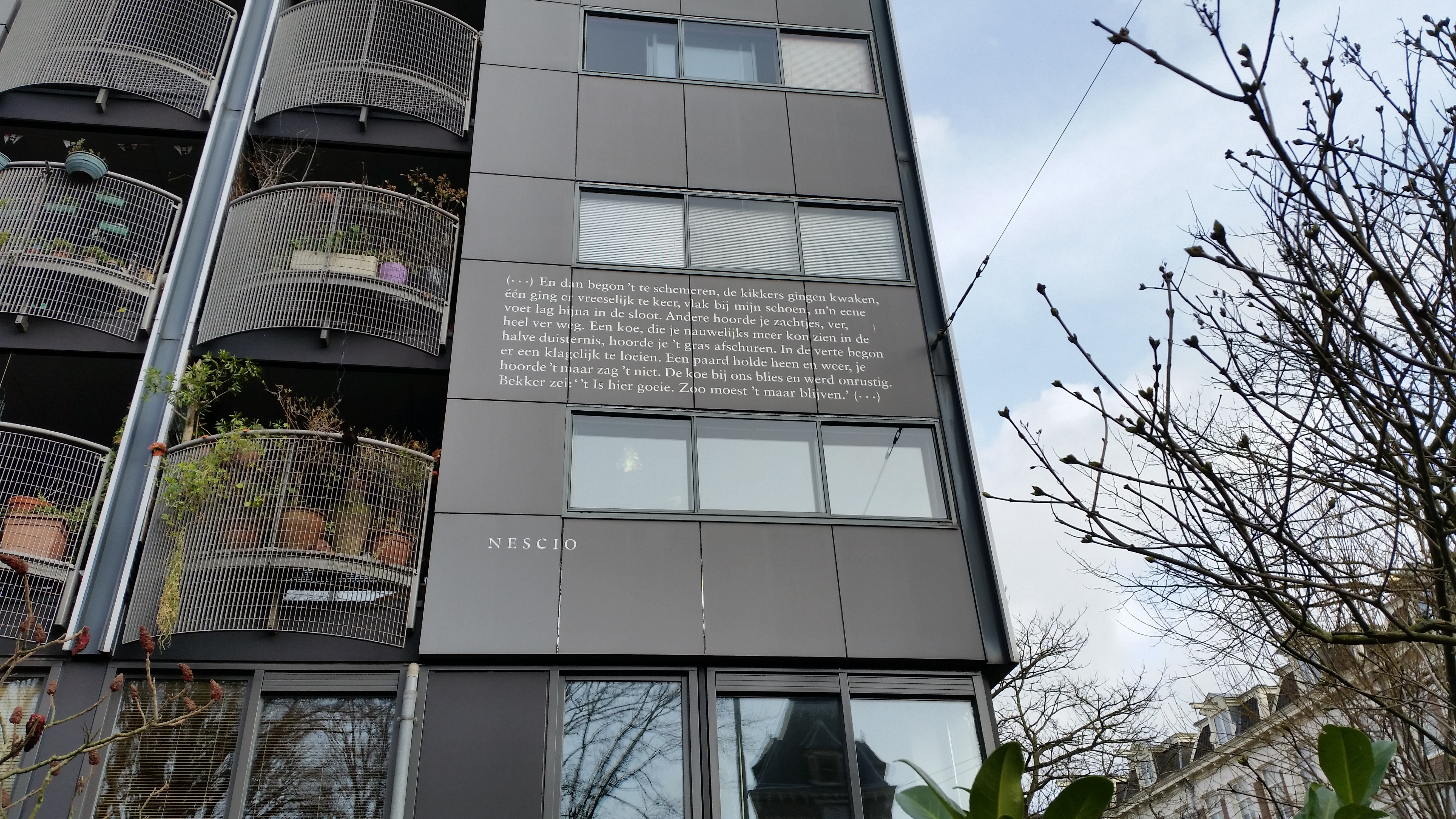 Impressie van Linnaeusstraat 7, Amsterdam-Oost ivm tekst van Nescio op de gevel